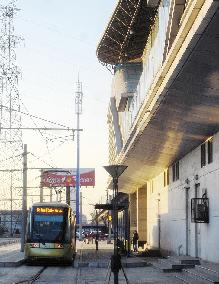 泰达站外的导轨电车一号线换乘站